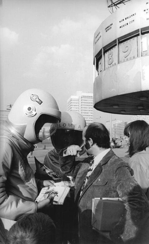 Berlin, Alexanderplatz, Filmwerbung ADN-ZB Junge 20.9.72 Berlin: "Sie entschuldigen, gelange ich in diese Richtung zum "Mondcafè". - "Kosmonauten" warben am 20.9.72 an der Weltzeituhr auf dem Alexanderplatz für den Film: "Eolomea" des VEB DEFA-Studio für Spielfilme, Gruppe Berlin, in Zusammenarbeit mit "Mosfilm"- Studio und Kinozentrum "Bojana" Sofia (70mm Farbfilm). Premiere ist am 21.9.72 20,00 Uhr im Filmtheater International der Hauptstadt. (Weiteres siehe ADN-Meldg.)